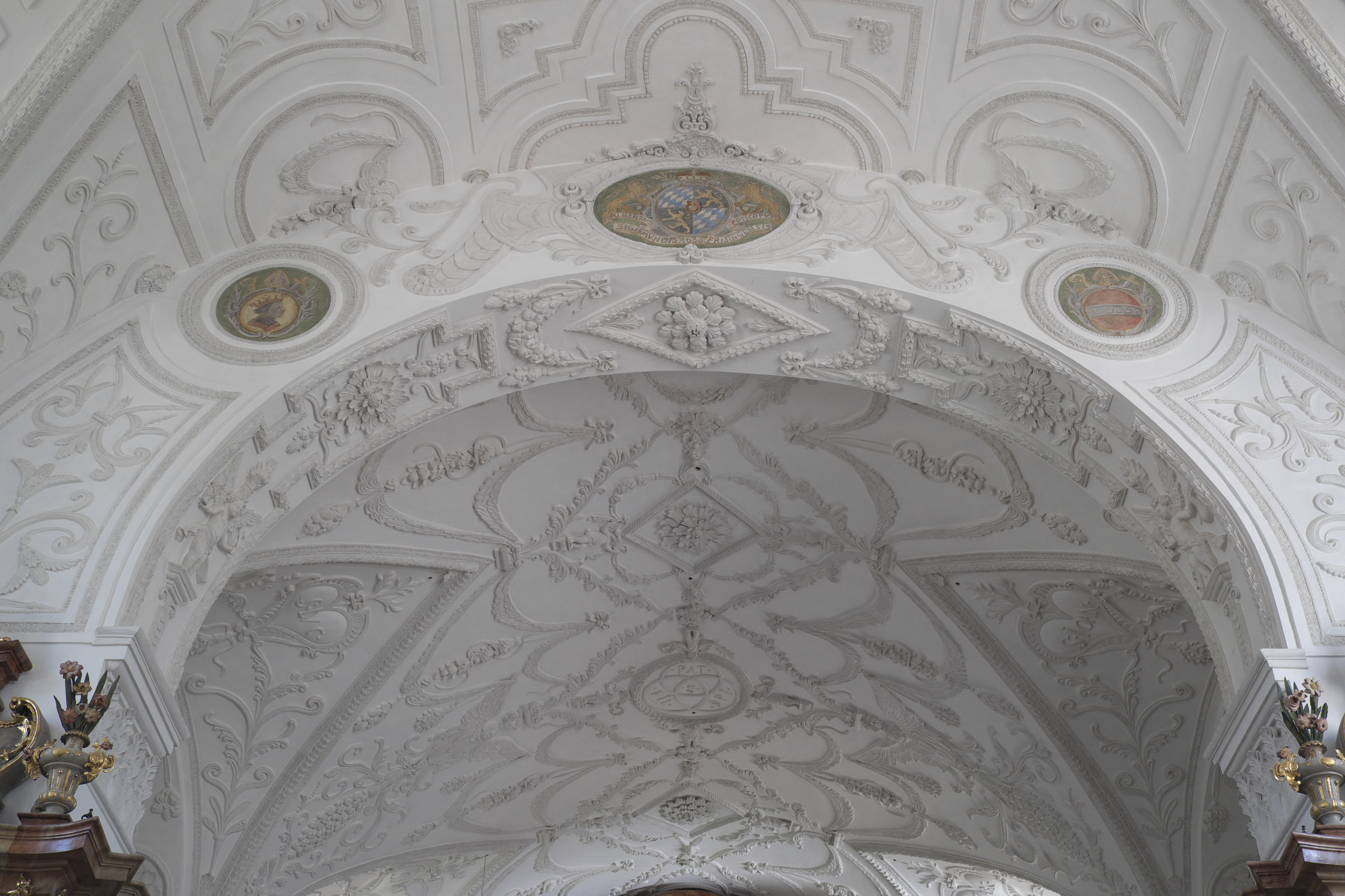 Katholische Pfarrkirche St. Lorenz in Oberföhring im Stadtbezirk Bogenhausen in München (Bayern/Deutschland), Stuckdecke von Wolfgang Zwerger, von 1677 bis 1680; Wappen am Chorbogen